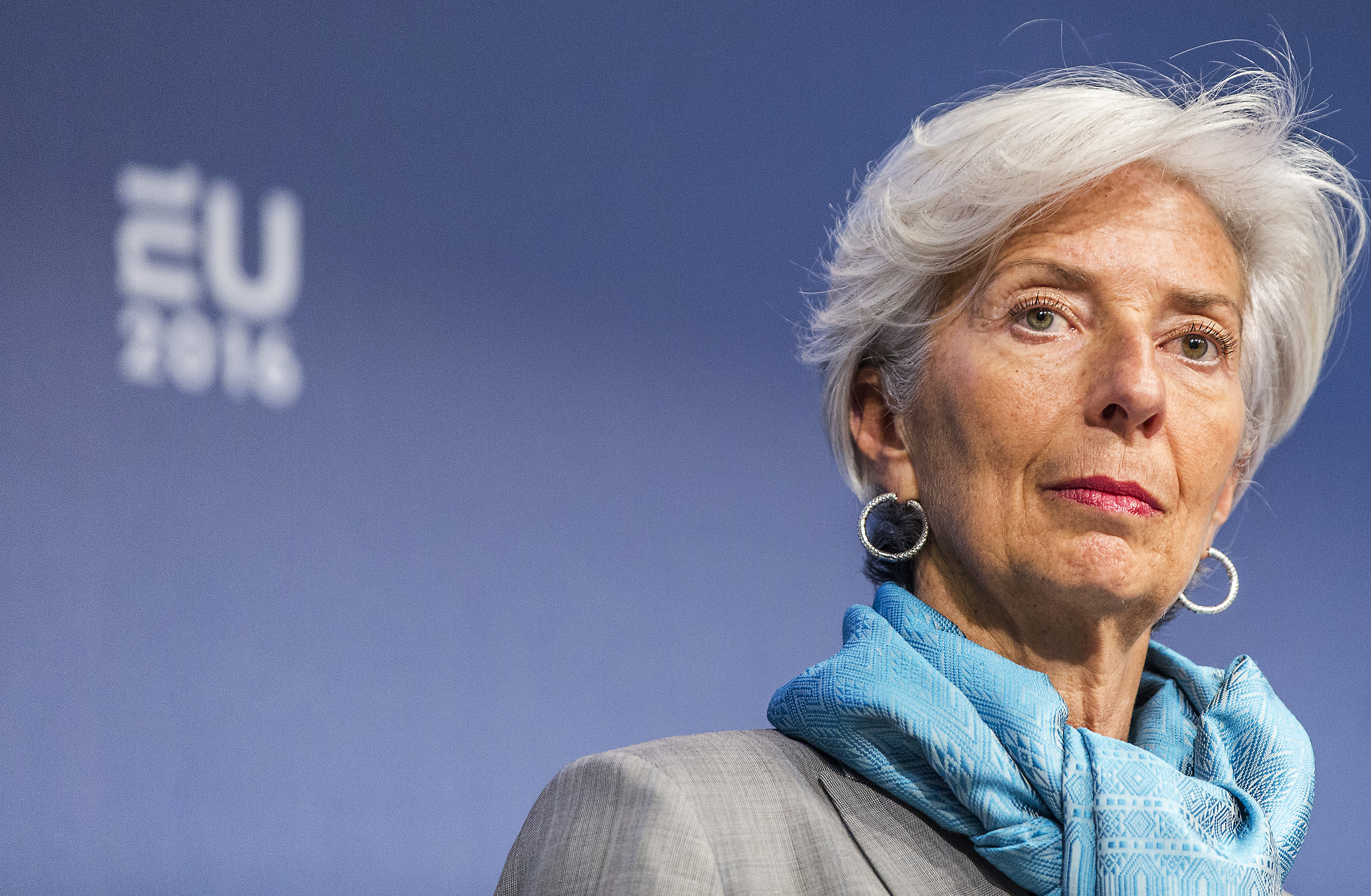 Amsterdam, 22 april 2016 / Amsterdam, 22nd of April 2016. Informele bijeenkomst van ministers van Financiën. Informal Meeting of EU Finance Ministers. Minister van Financien Jeroen Dijsselbloem, staatssecretaris Eric Wiebes. Foto: Rijksoverheid/Valerie Kuypers – Photograph: Dutch Government/Valerie Kuypers